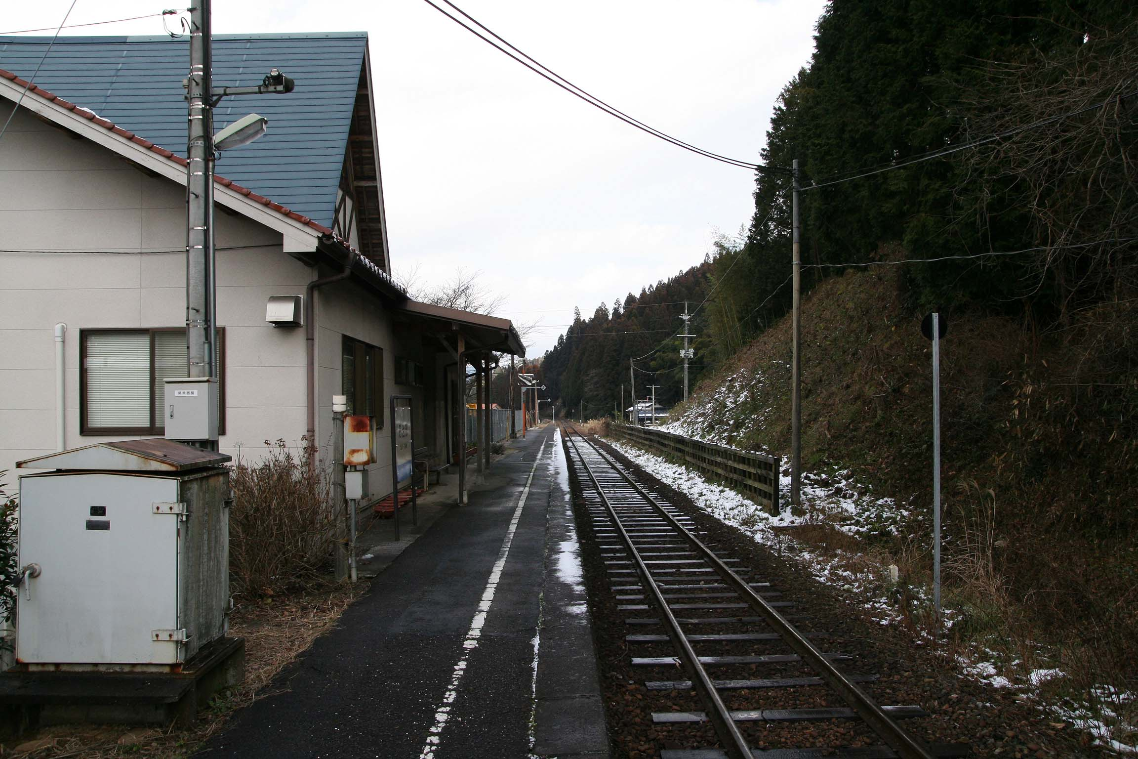 丹治部駅の構内